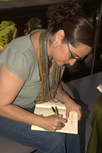 Susana Pagano firma un libro en el ITESM-Campus Ciudad de Mexico